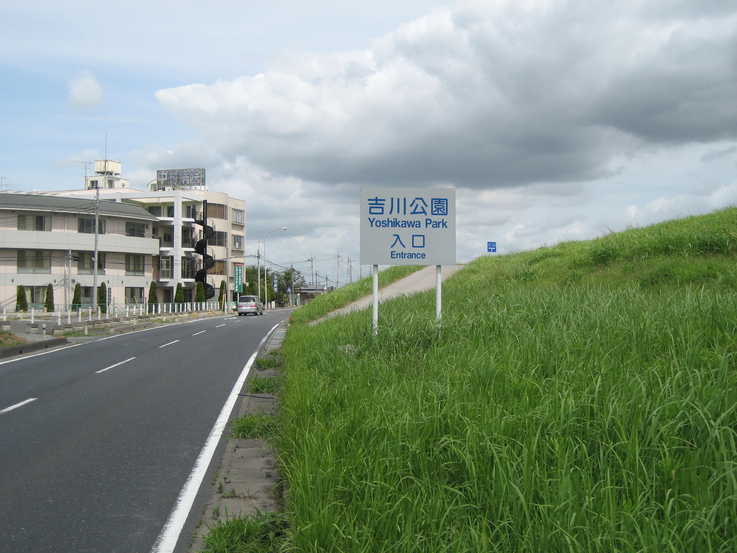 吉川公園入口